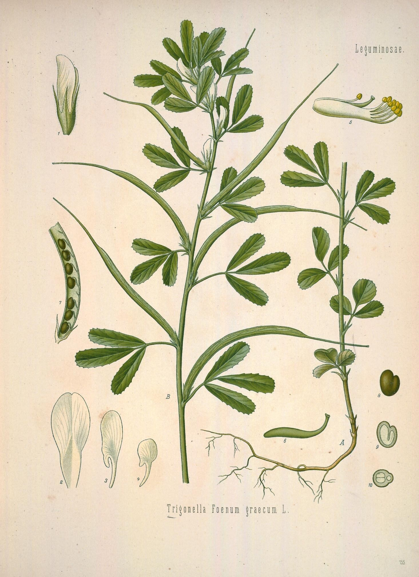 Trig onella Fo e num. Jraecum